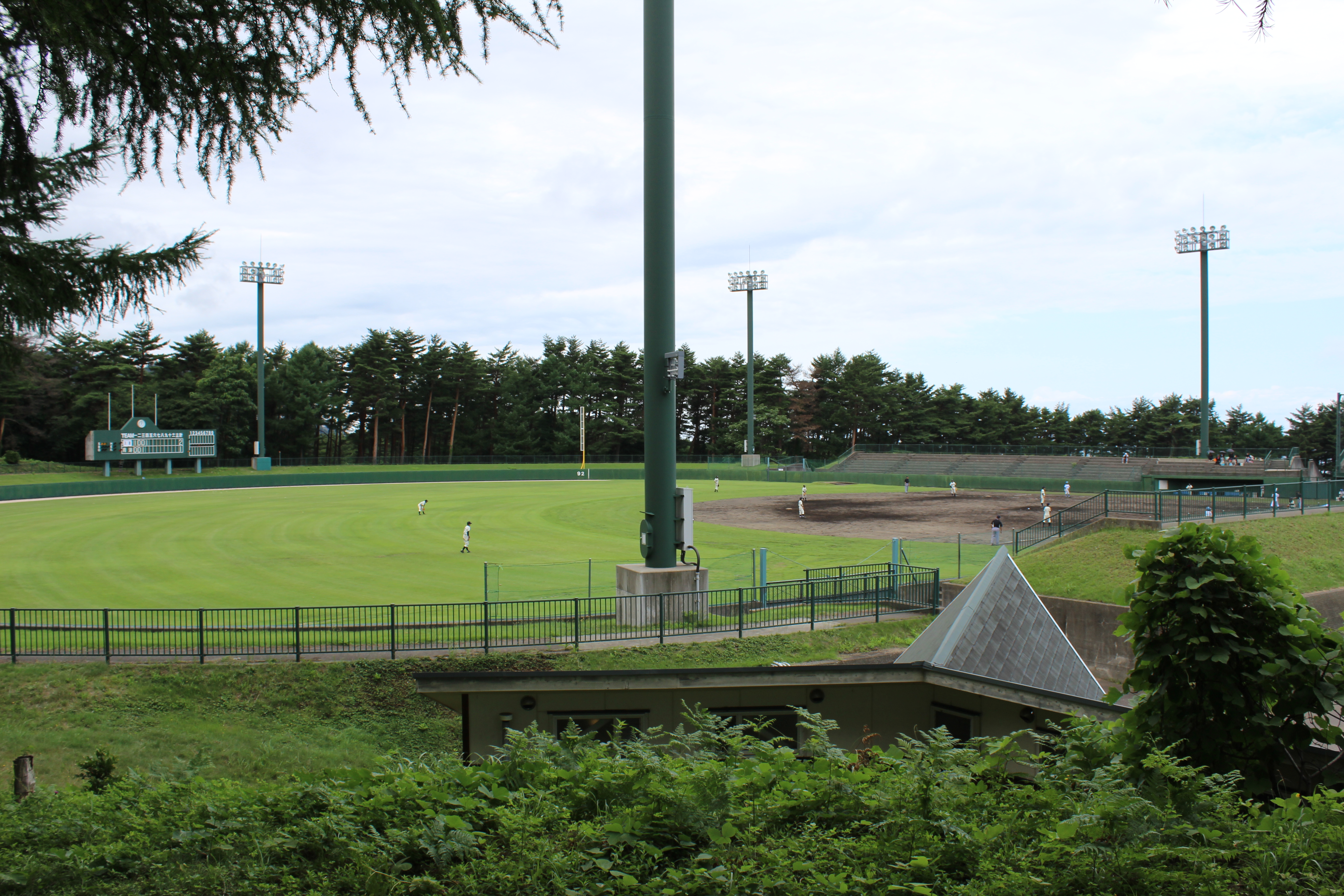 美山球場。糸魚川市営。新潟県糸魚川市大野65-1。